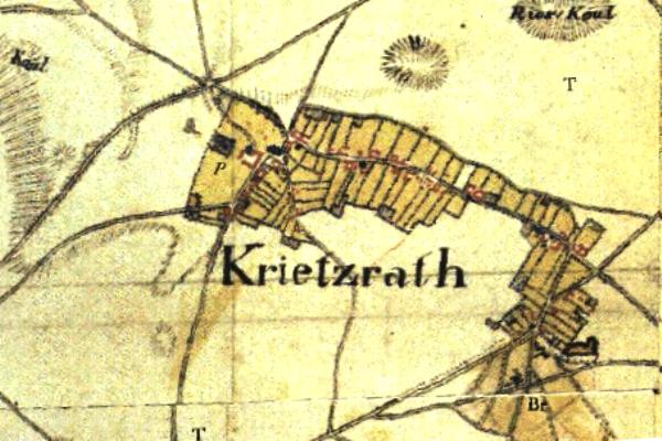 Kartenaufnahme der Rheinlande 1804/05